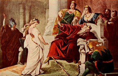 Отричането от Корделия